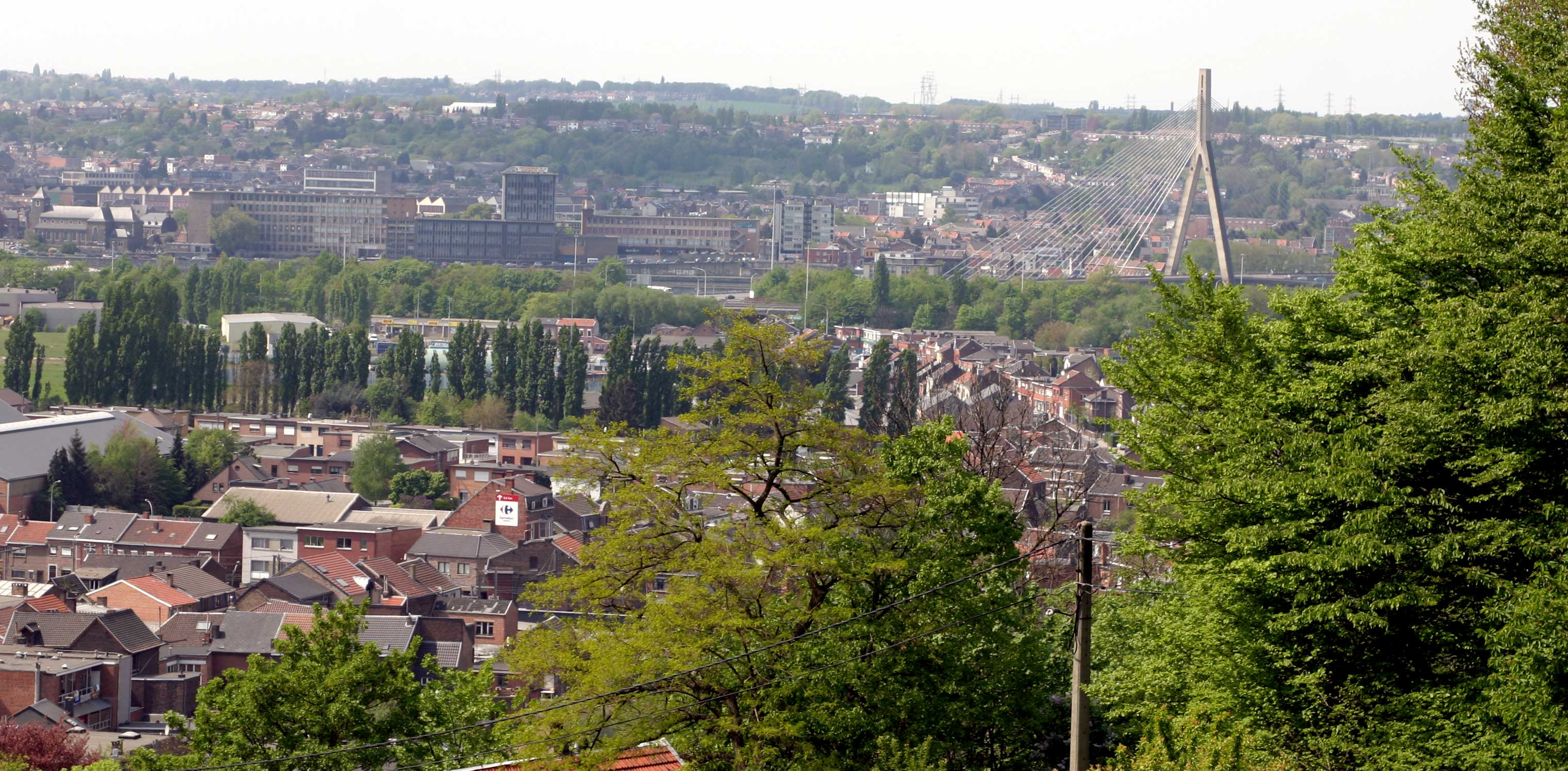 Sujet:Vue iwwer Herstal Source:Eege Foto vum User:Les Meloures